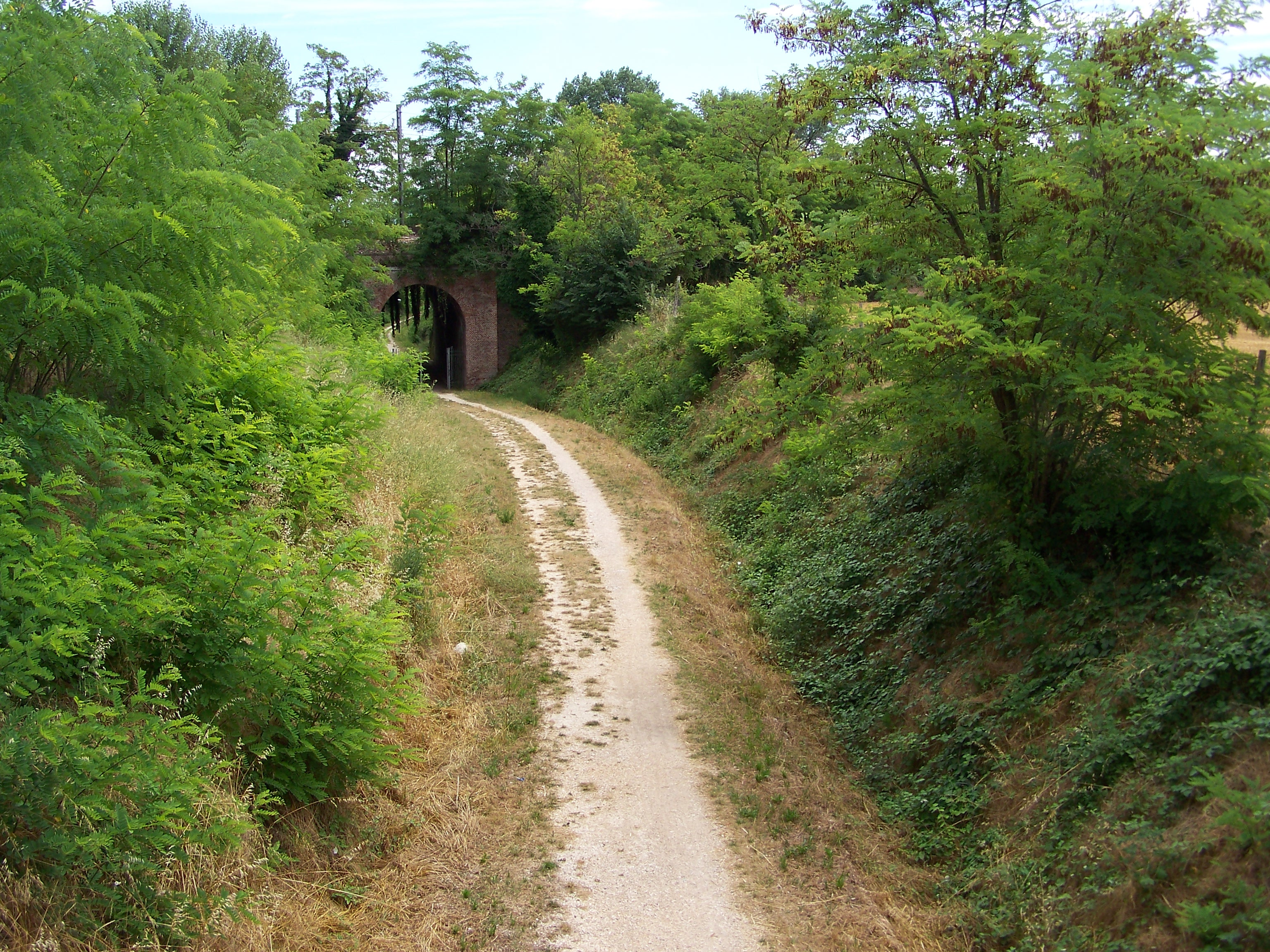 Il percorso in trincea della dismessa ferrovia Maratona prima del sottopasso della Milano-Venezia.